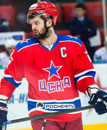 Нападающий московского ЦСКА Александр Радулов во время матча чемпионата КХЛ против новосибирской «Сибири» 28 октября 2012 года.